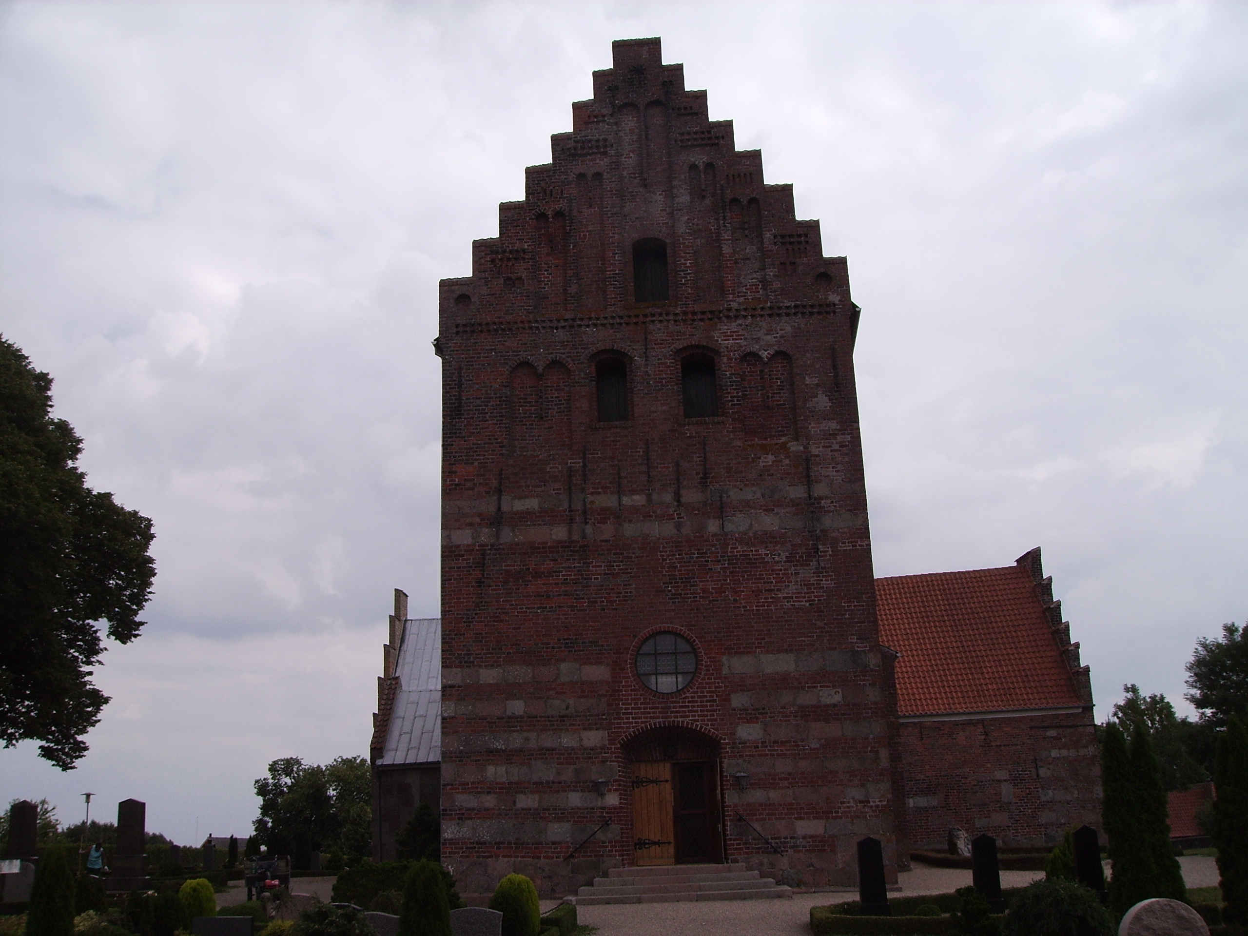 Skamby Kirke fra vest, Skamby Sogn, Skam Herred, Odense Amt, Denmark (Danish Church)